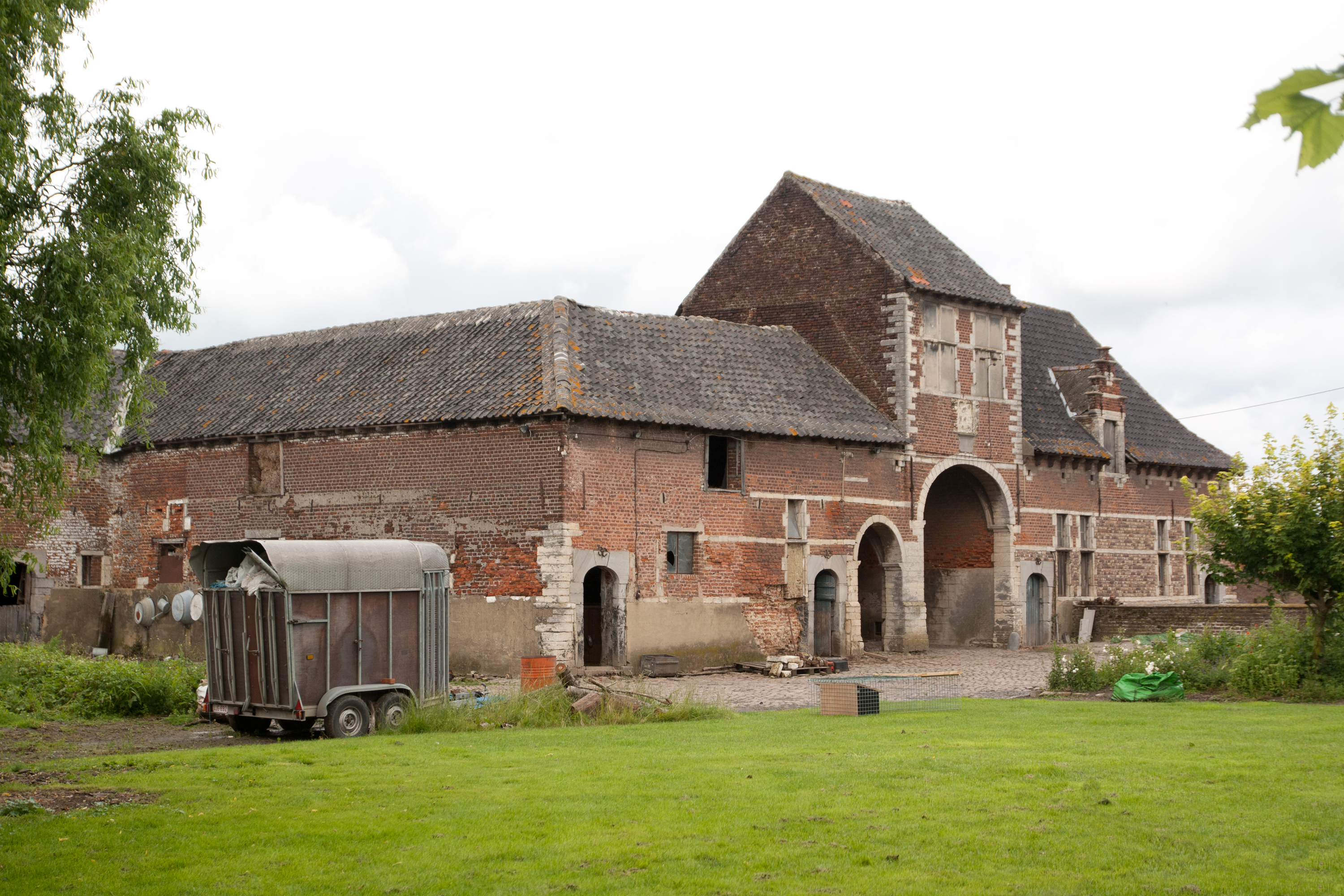 Zicht op de vervallen en verwaarloosde resten van de hoeve van Cisterciënzerinnenabdij Maegdendael te Oplinter